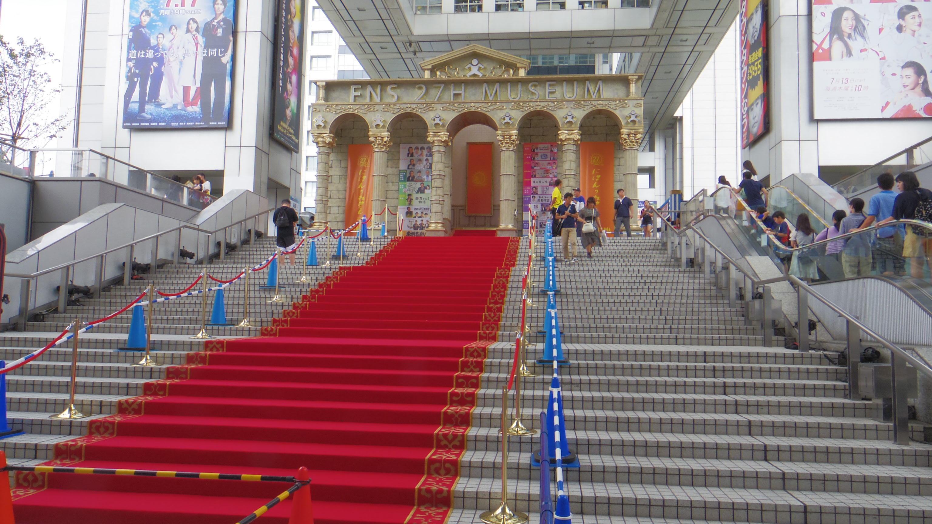 「FNS27時間テレビ にほんのれきし」放送（2017年9月9日・10日）を記念して作られたミュージアムセット。当日の番組内でも使用された。2017年8月27日、東京・台場のフジテレビ本社屋「お台場みんなの夢大陸」大階段にて撮影。